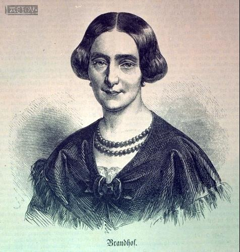 Portrait der Postmeisterstochter Anna Plochl, Freifrau von Brandhof und Ehefrau Erzherzog Johanns, aus Das Jahr 1848. Geschichte der Wiener Revolution